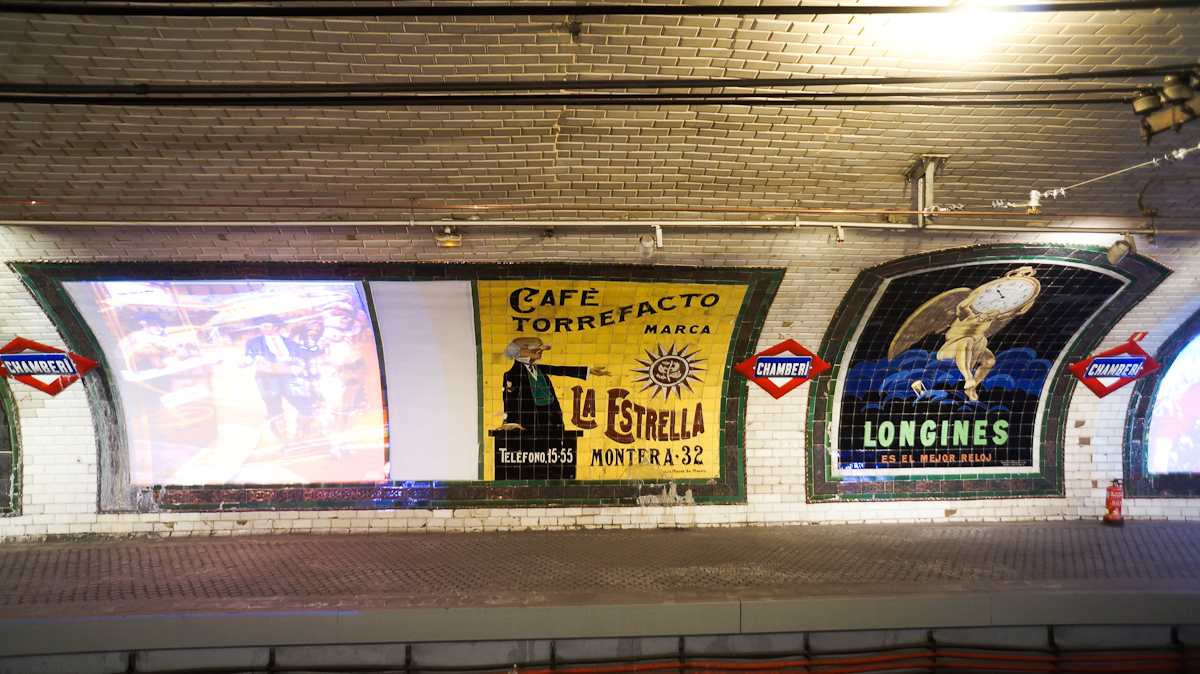 Estación de Chamberí Anuncio de café torrefacto de La Estrella (hoy en día Productos del Café S.A.) y Relojes Longines. Ambas empresas siguen operando en la actualidad. Puedes ver la entrada completa en